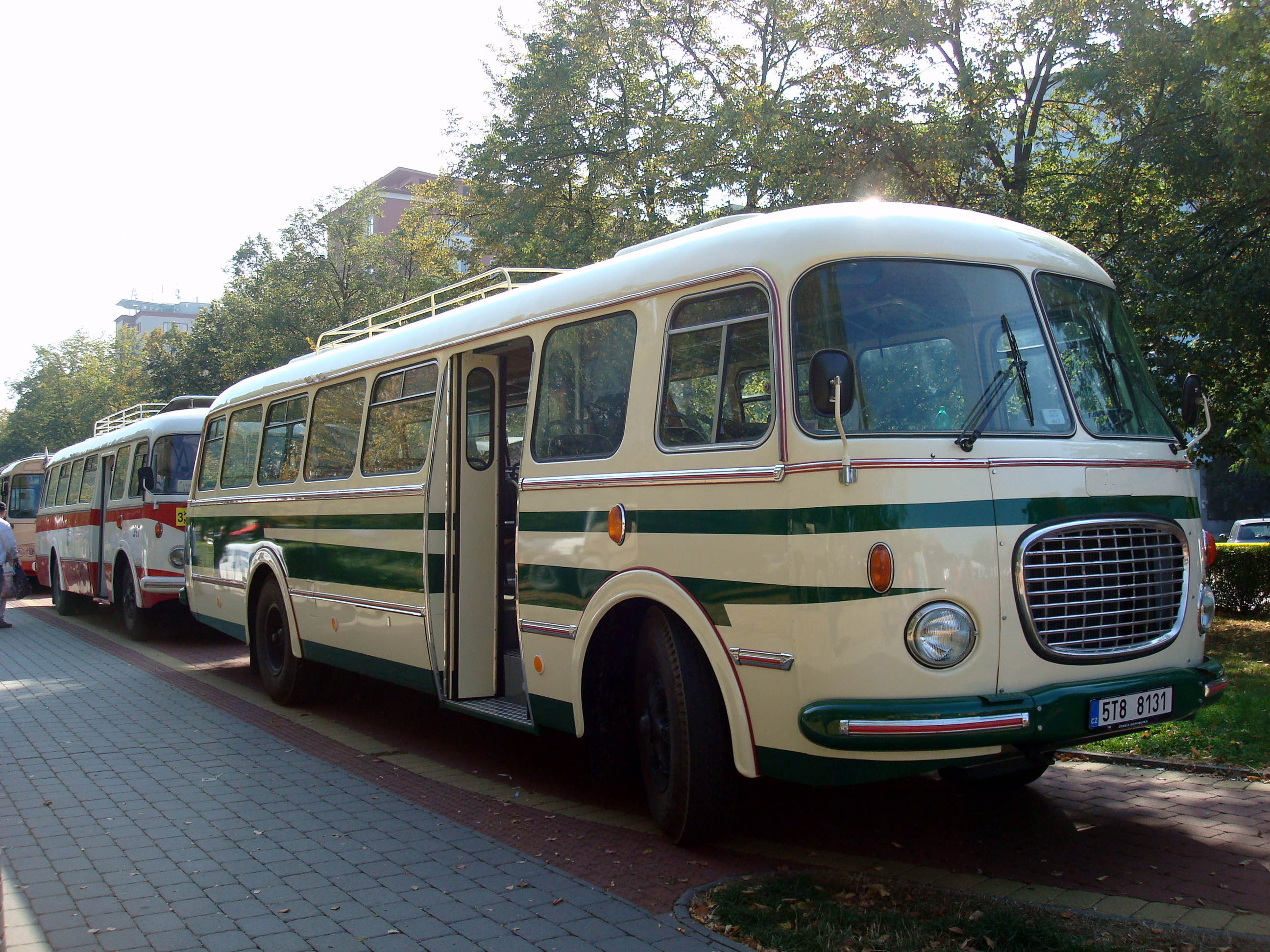 Historický autobus Škoda 706 RTO CAR v Ostravě